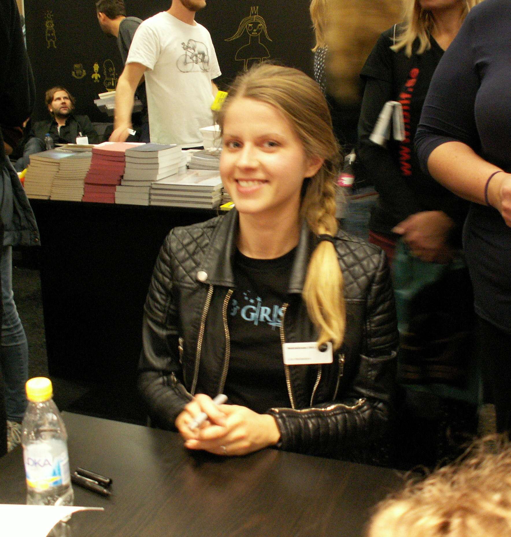 Lina Neidestam på Bokmässan i Göteborg 2013. Här sitter hon vid signeringsbordet i Kartago förlags monter.